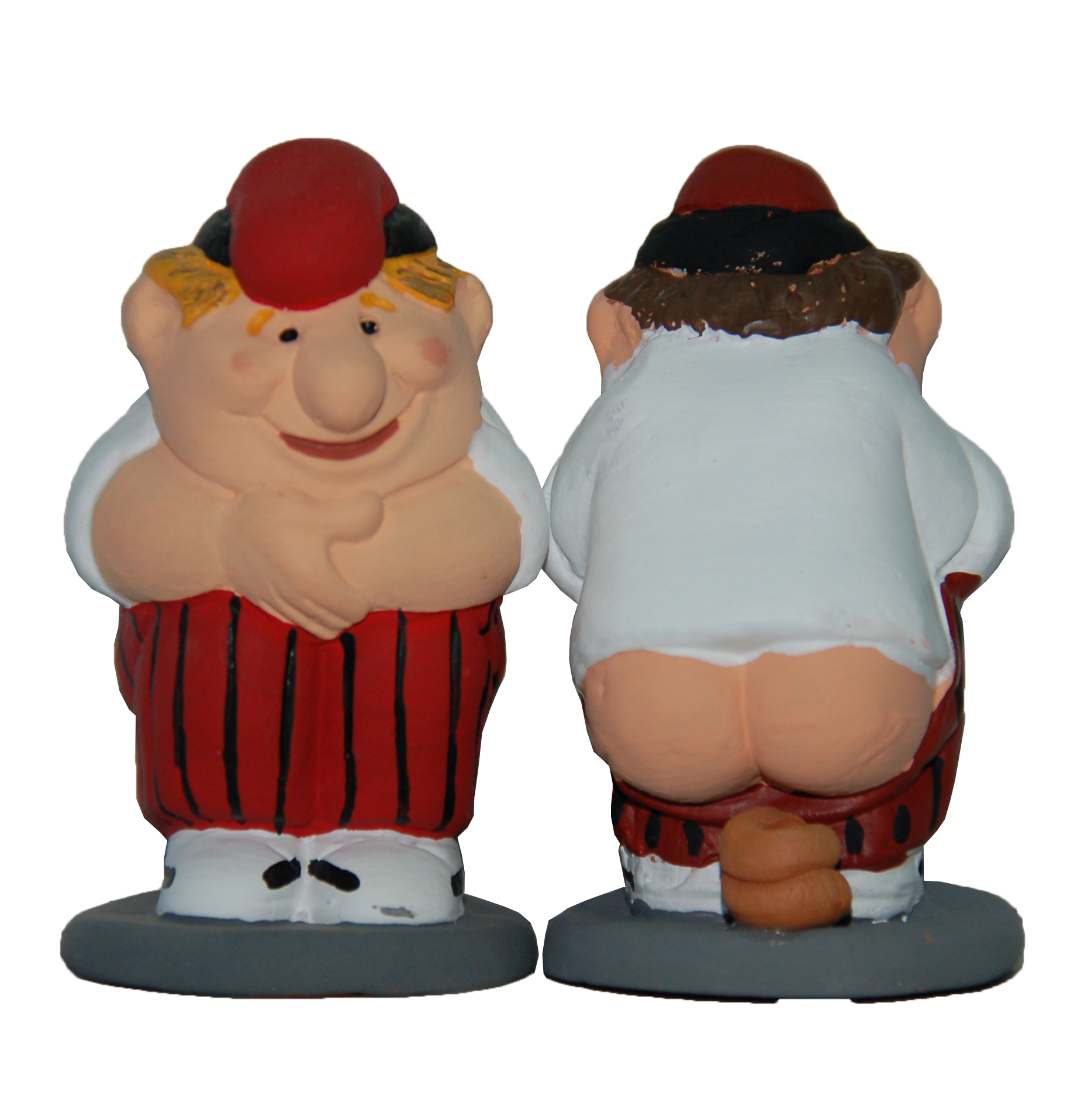 Caganer Pages Catala